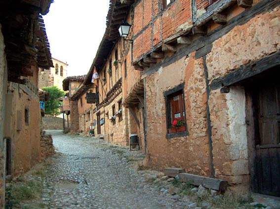 Calatañazor-Calle La imagen es mía y la protejo bajo GFDL Categoría:España (imagen)